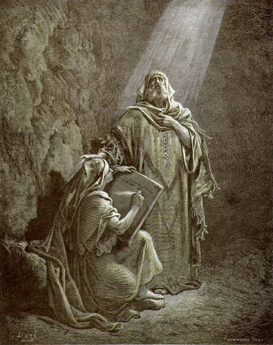 Gravure sur l'Ancien Testament